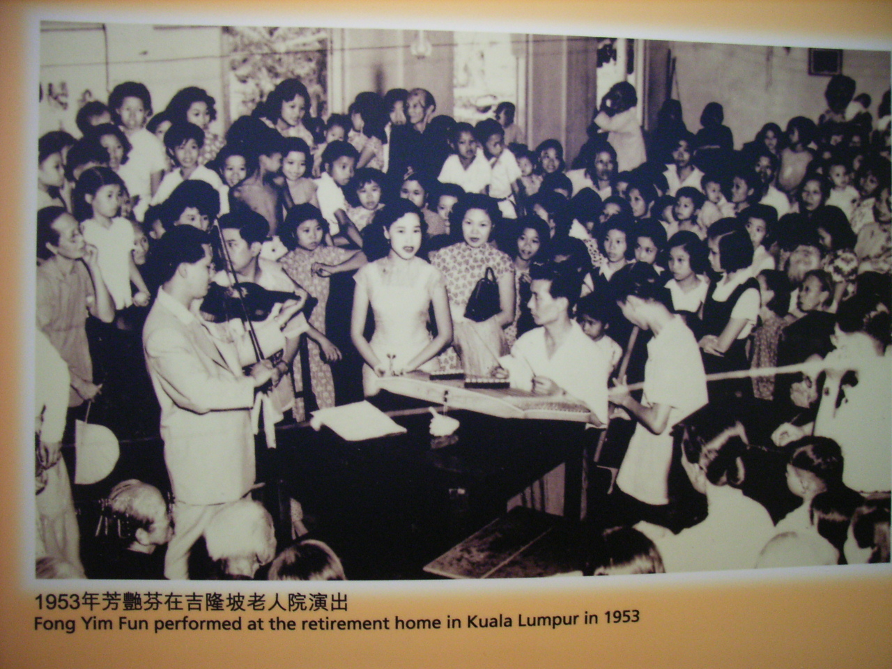 香港戲曲歷史文物展 2006年2月28日至6月30日